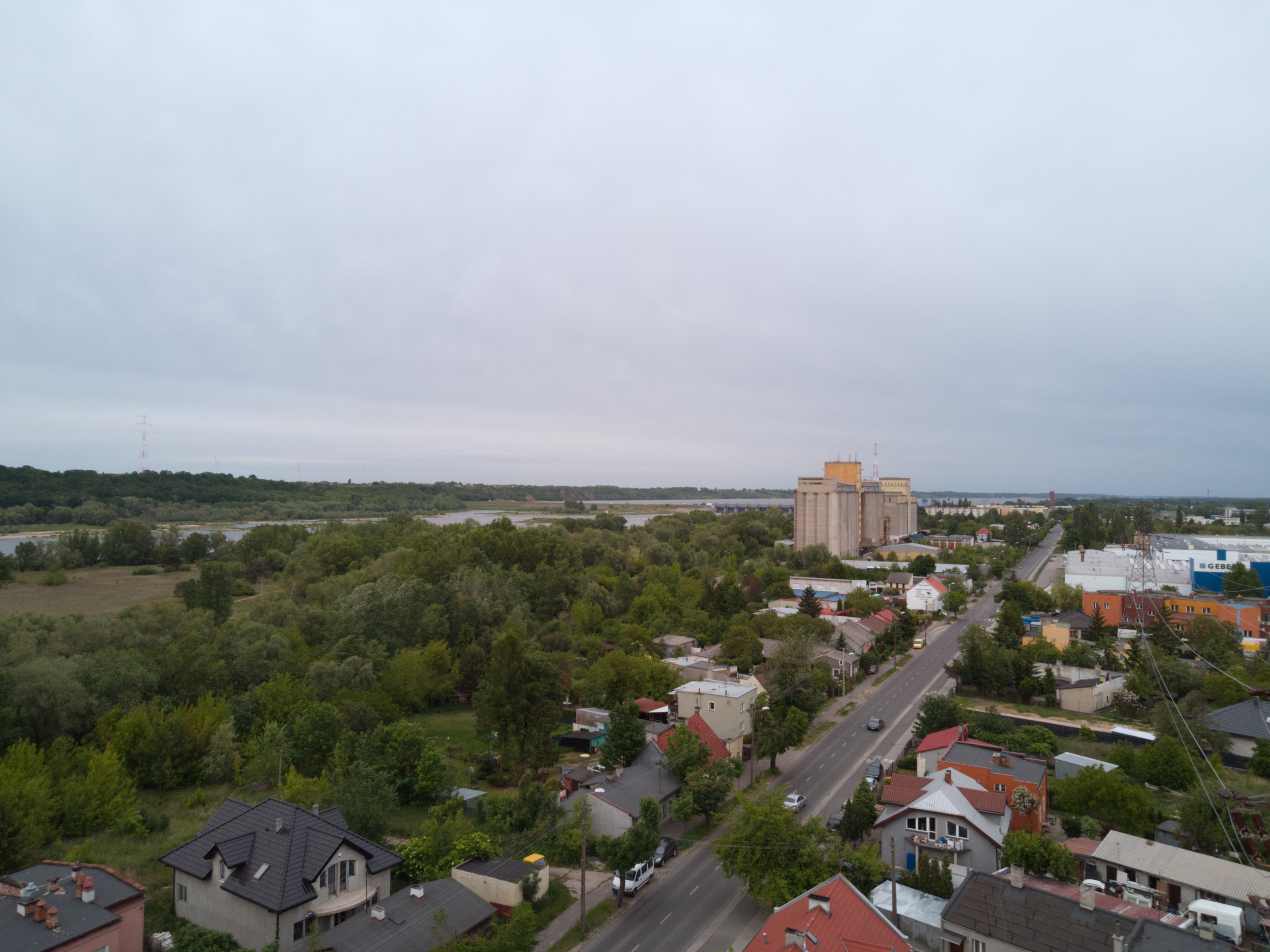 Kazimierza Wielkiego (2020 r.)